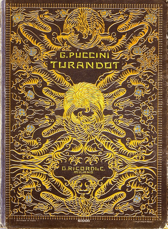 Spartito del dramma lirico in tre atti e cinque quadri, stampato a Milano per i tipi di Giulio Ricordi & C. nel 1926 (SAS Modica, Biblioteca Moncada)